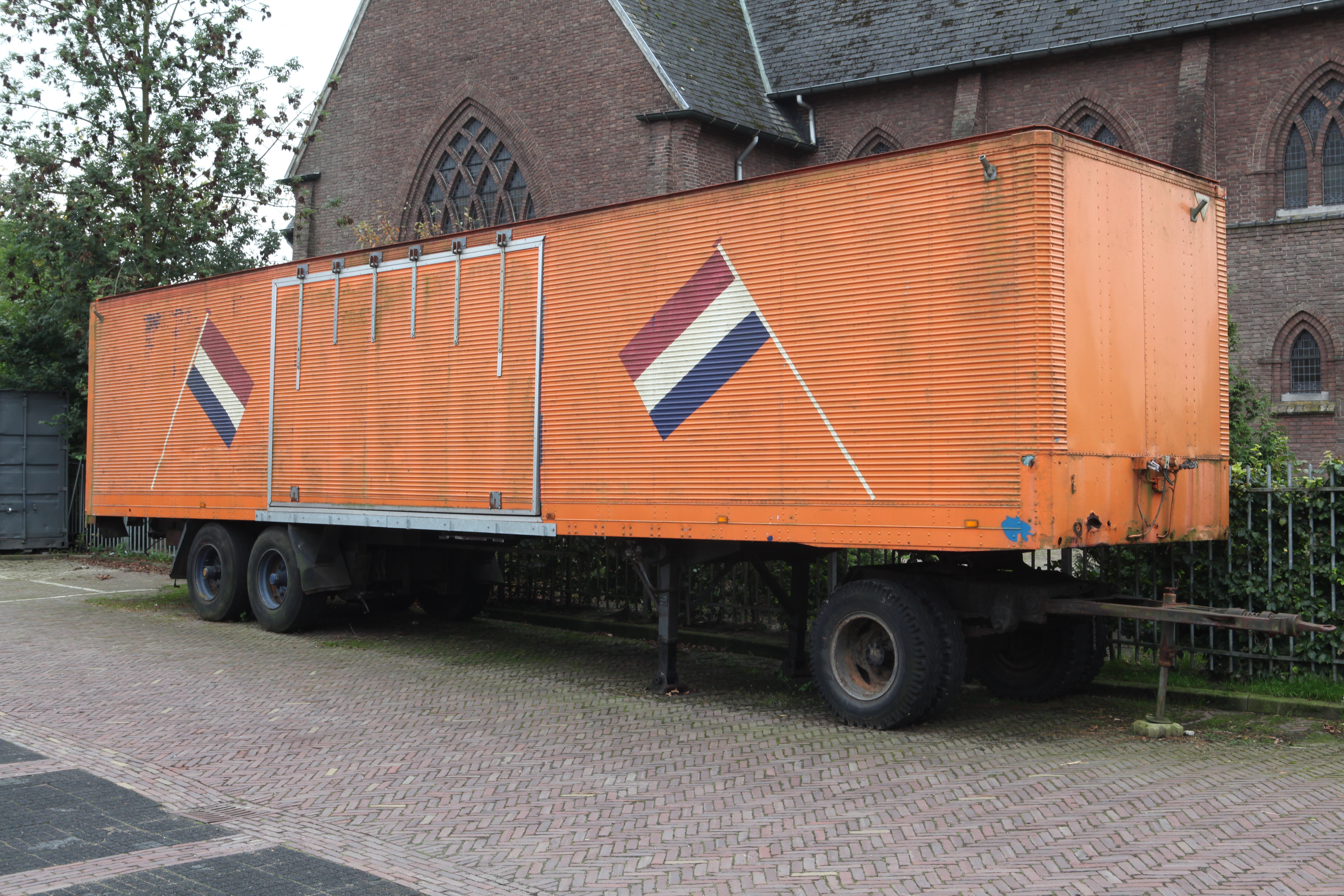 Old Fruehauf truck Trailer